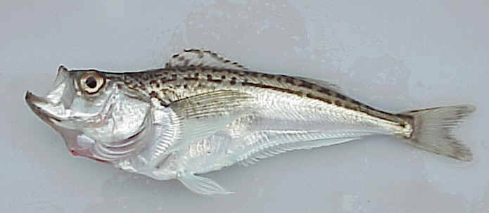 Trichodon trichodon